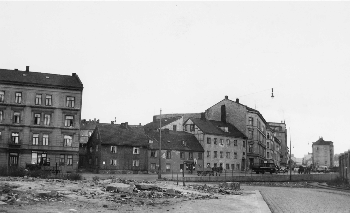 Husrekke i Munkedamveien med (fra høyre mot venstre) nr. 37, 39, 41, 45 (høy murbygning), 47, 49, 51 og 53. På høyresiden ses bl.a. nr. 24 (forbi bro over jernbanen vest for Oslo V). Foto: Georg Gjersøe, ca. 1938. Fra Byhistorisk samling hos Oslo Museum.